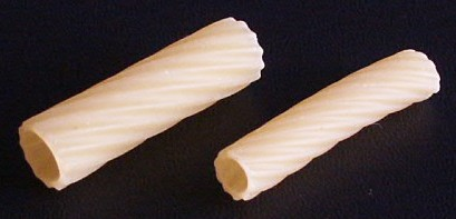 PastasortenTortiglioni